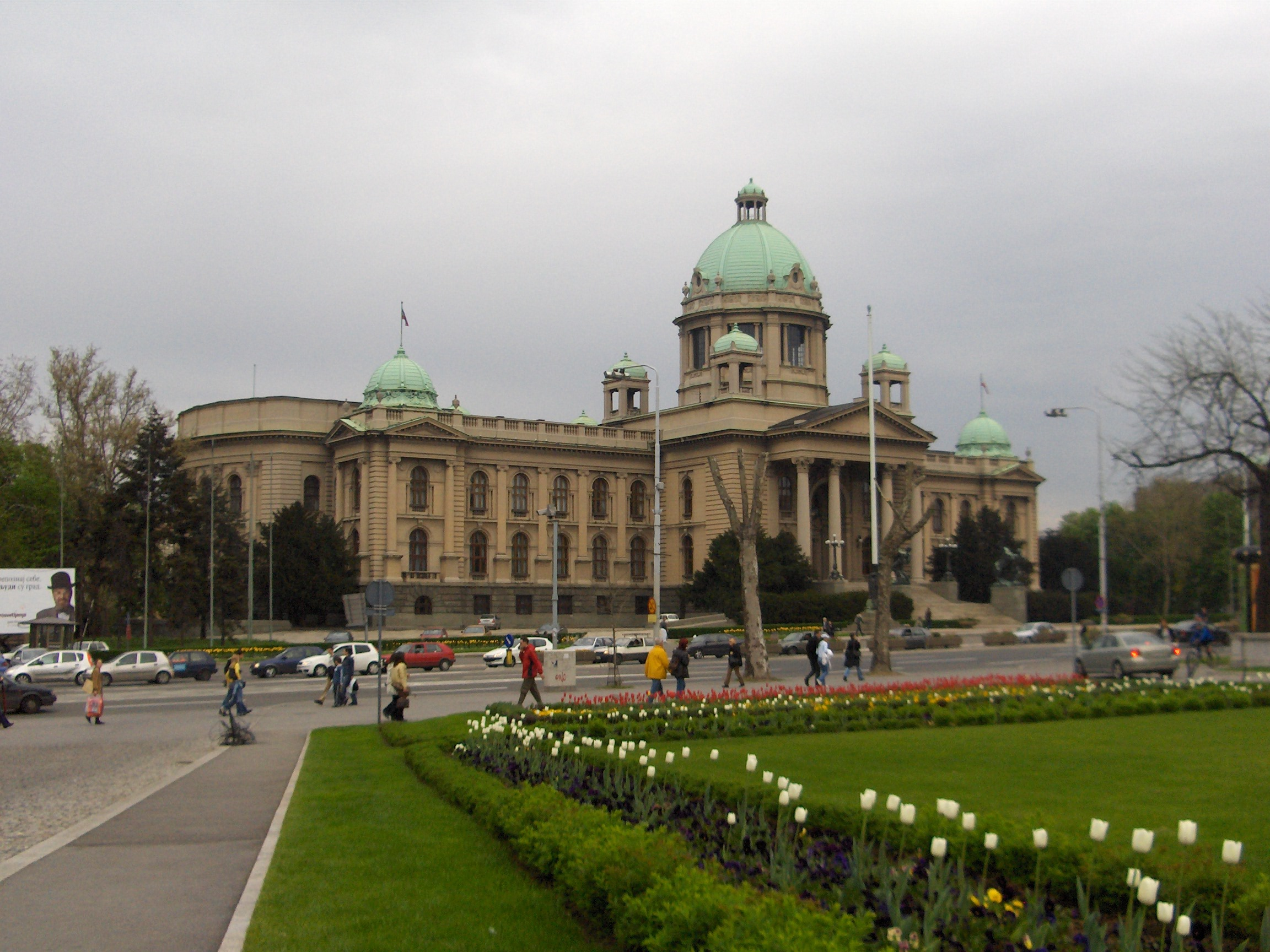 Serbian Parliament